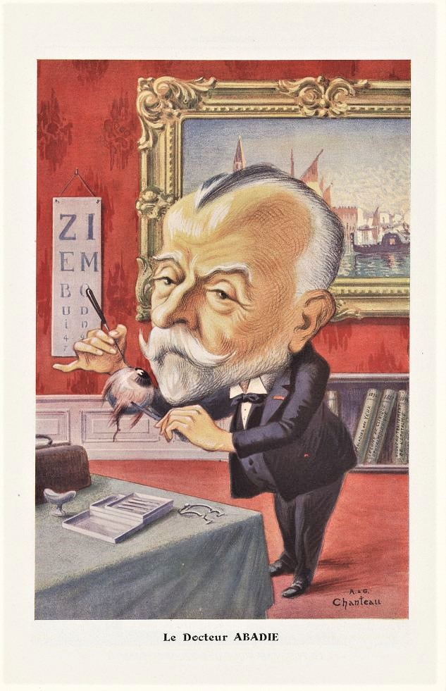 A.& G. Chanteau [Caricature] Le Docteur Abadie - Chanteclair Revue : Chanteclair, 9e année Edition : Romainville : Carnine Lefrancq, 1914